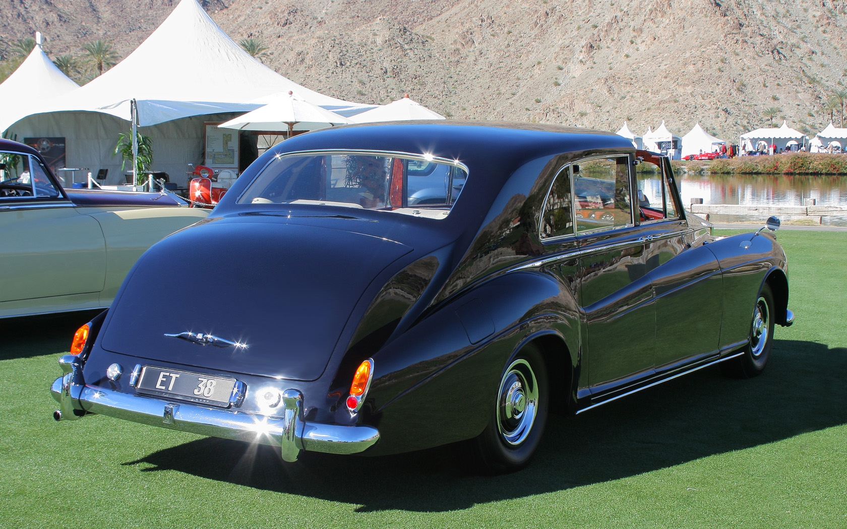 2011 Desert Classic, La Quinta, CA